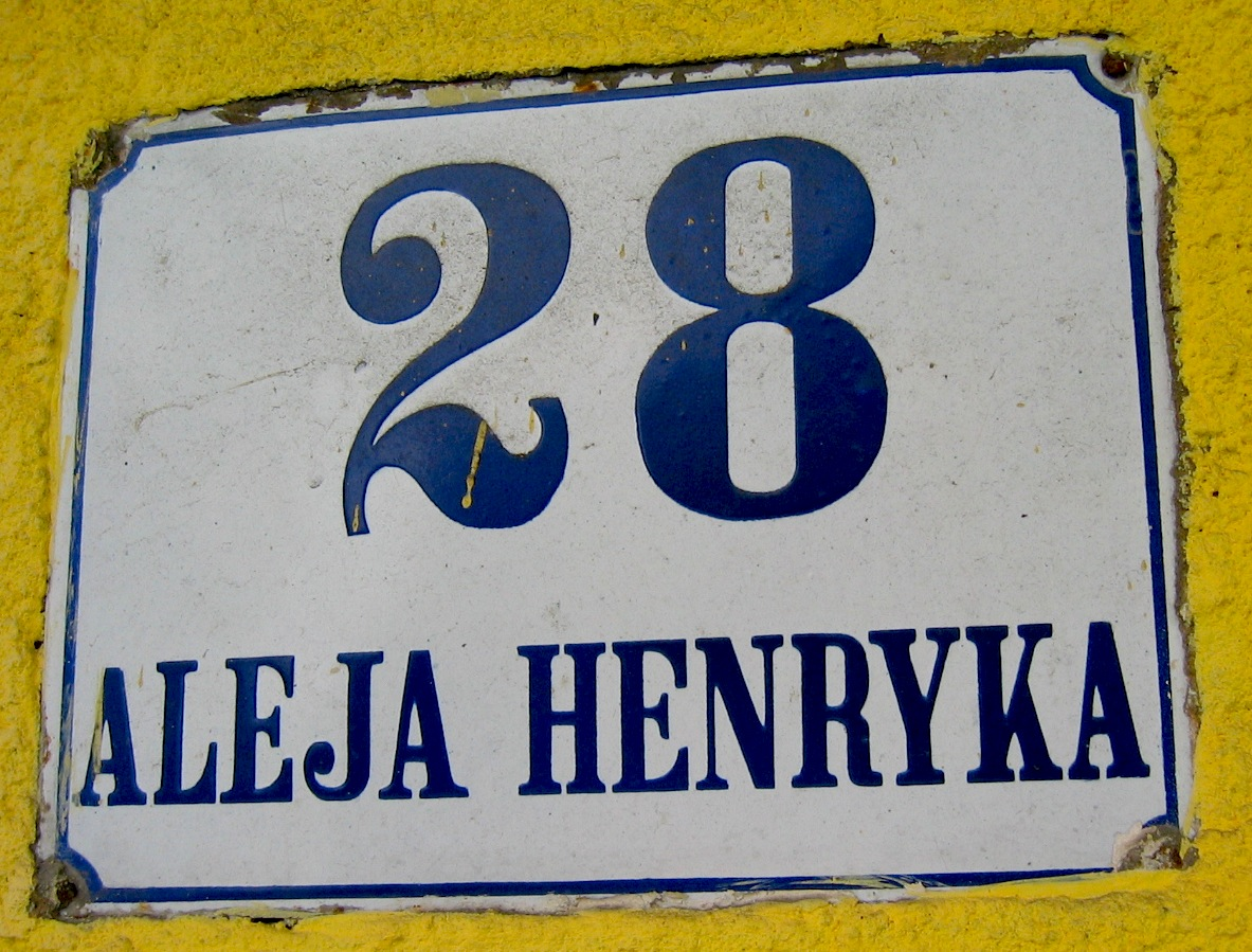 Chrzanów, Aleja Henryka/Chrzanów, Henry Avenue